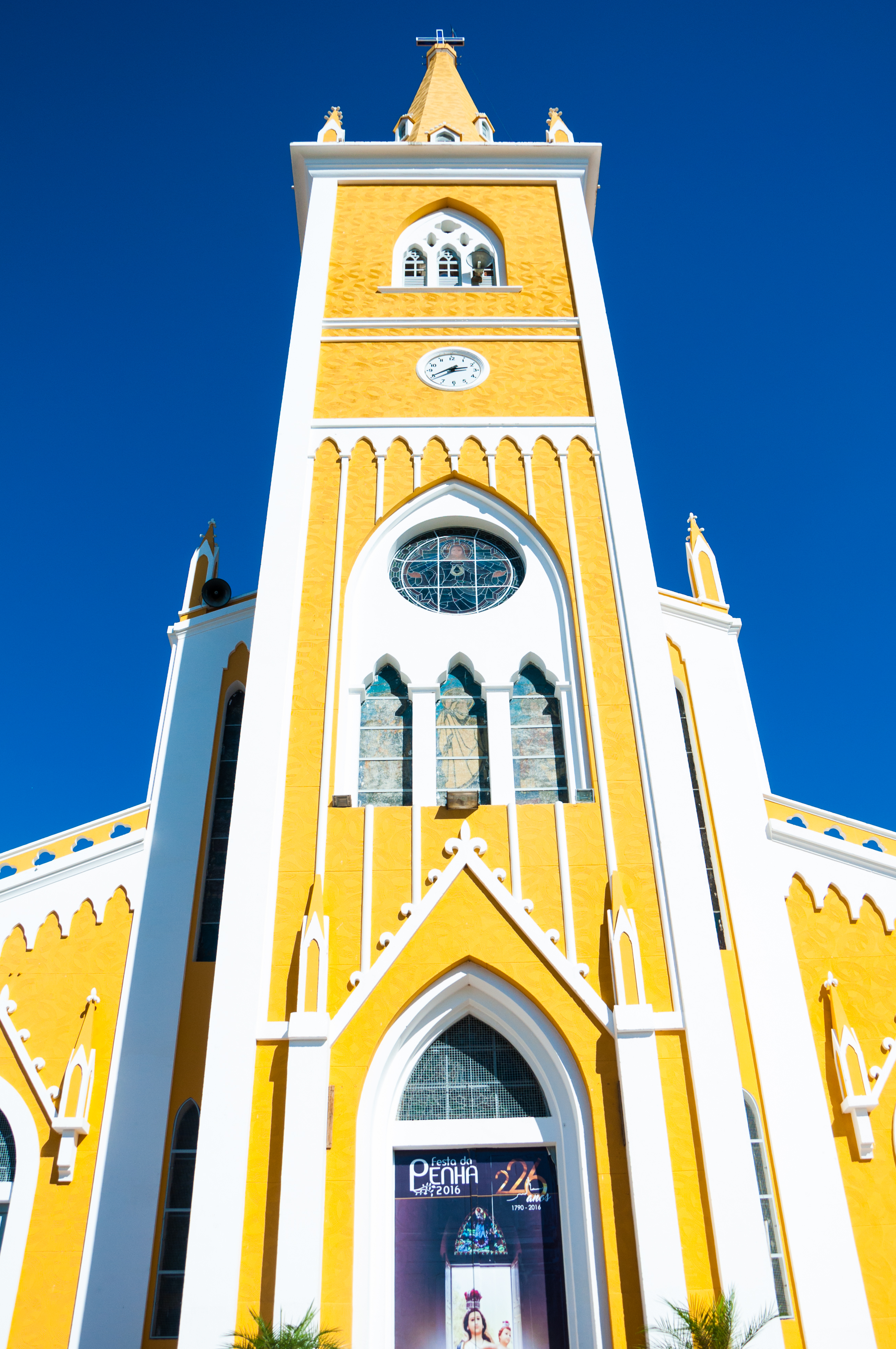 Igreja Matriz da cidade de Serra Talhada - PE